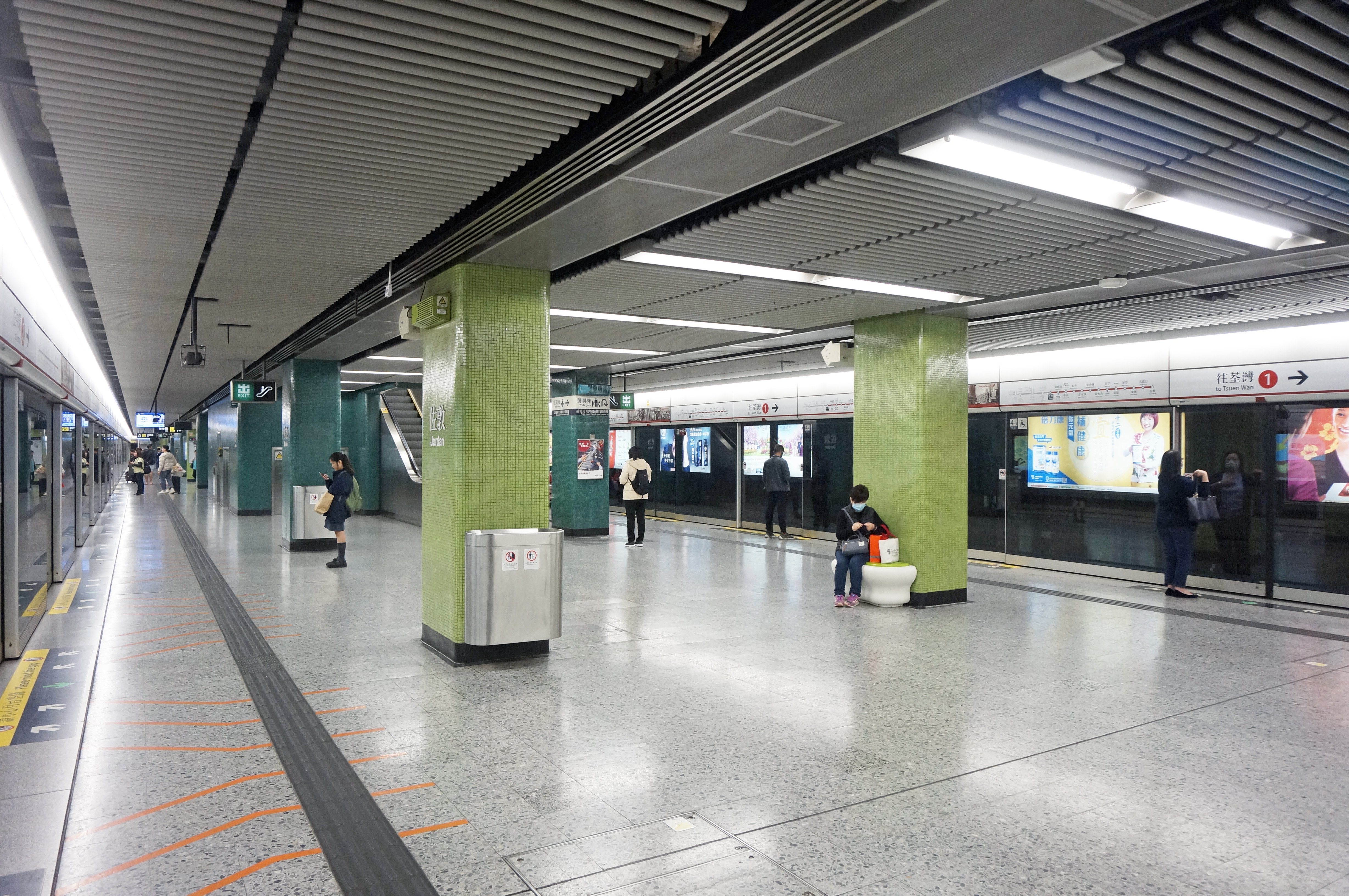 港鐵佐敦站月台